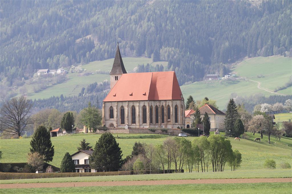 Kath. Pfarrkirche St. Maria im Paradeis, Friedhof